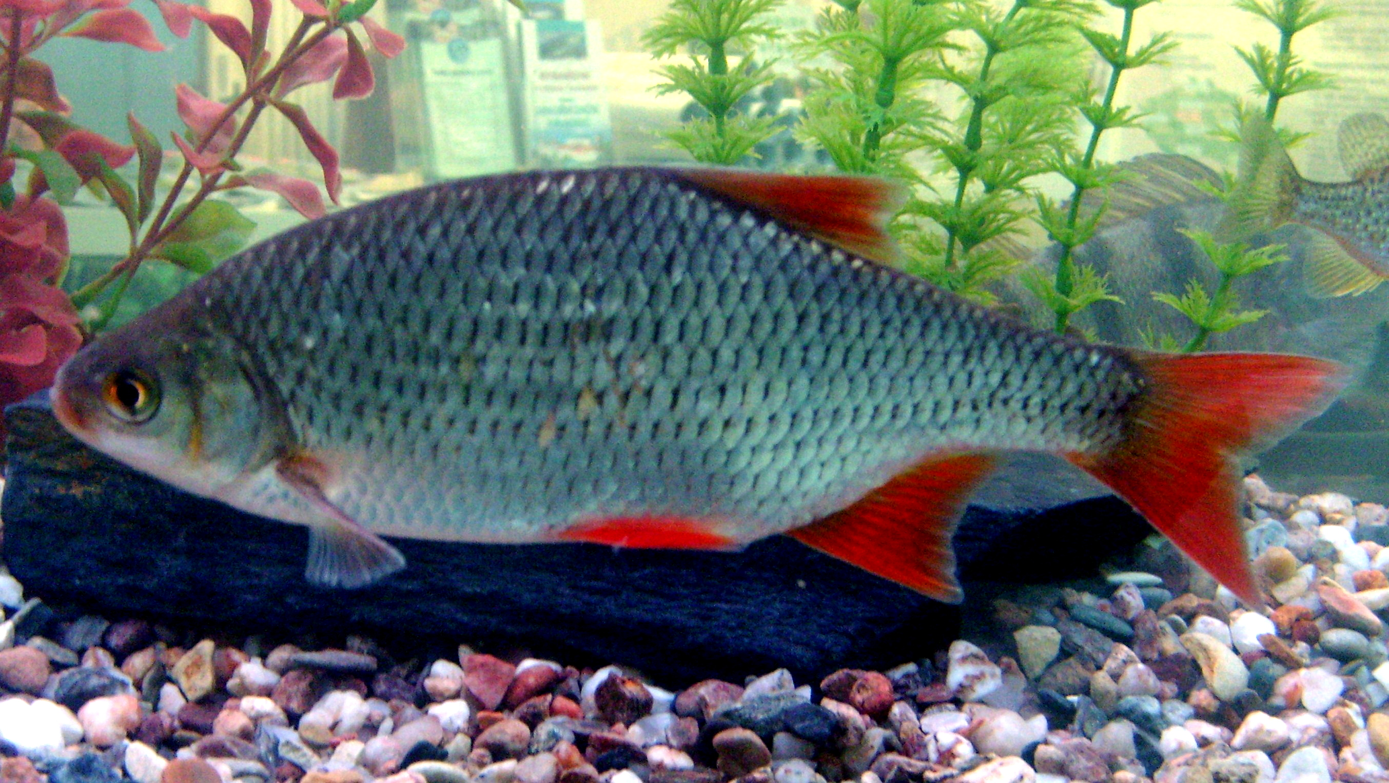 Perlín ostrobřichý v akváriu na veletrhu Petrův zdar.